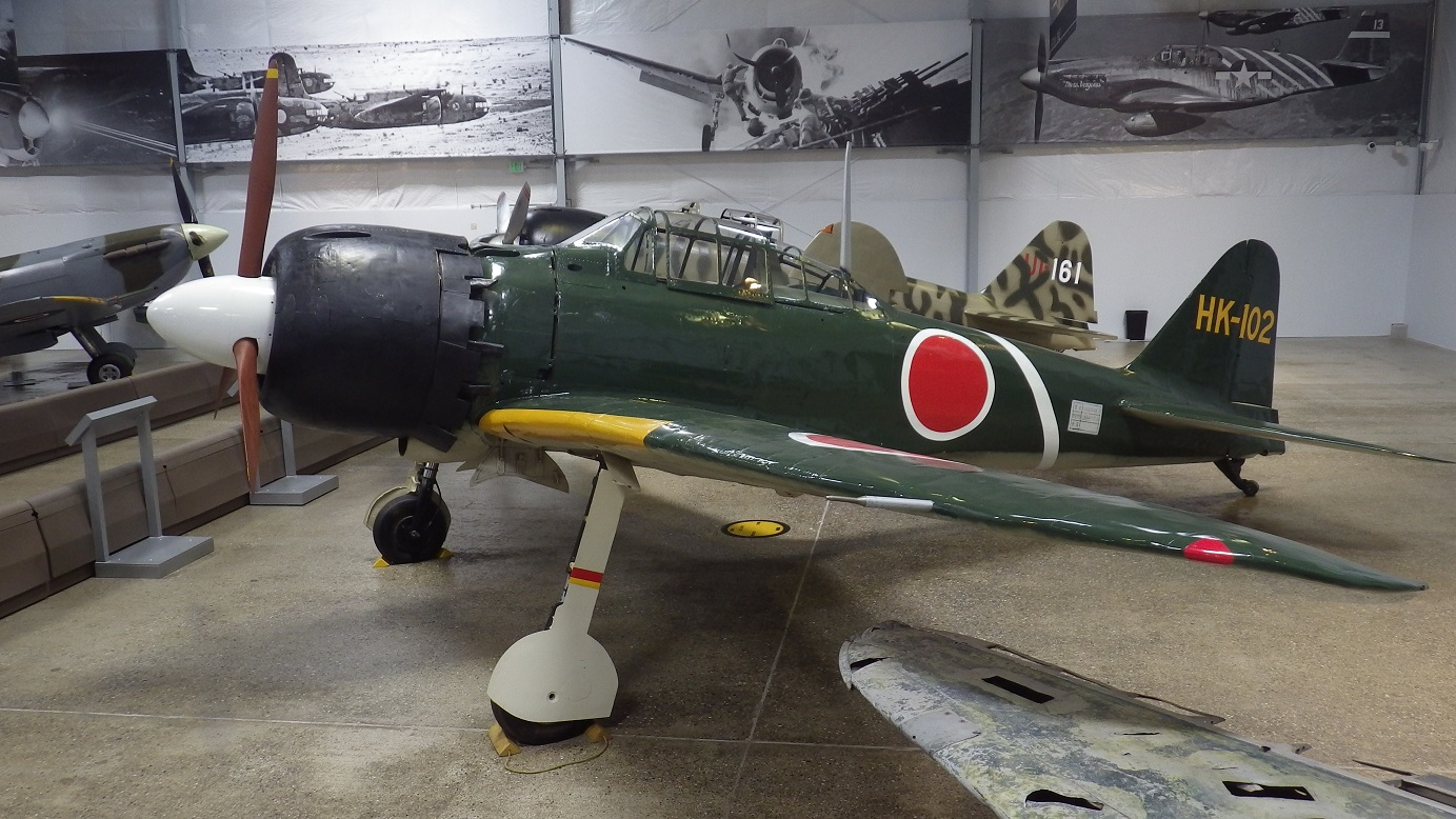 零式艦上戦闘機 五二型 尾翼番号 HK-102 Flying Heritage Collection 所蔵